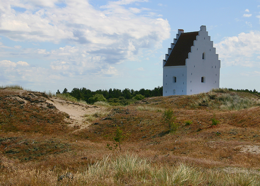 Skagens tilsandede kirke, Skagen Sogn, Horns Herred, Hjørring Amt